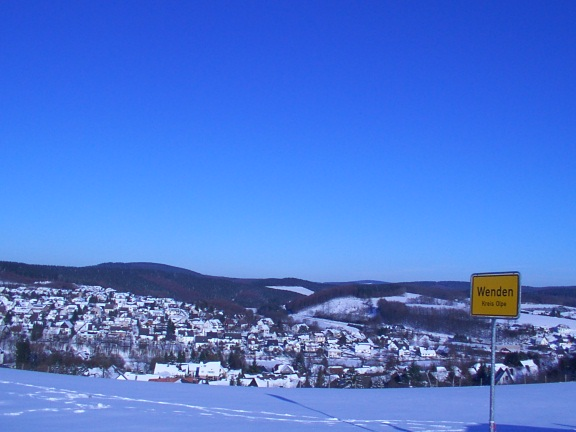 Ort Wenden im Winter 2002